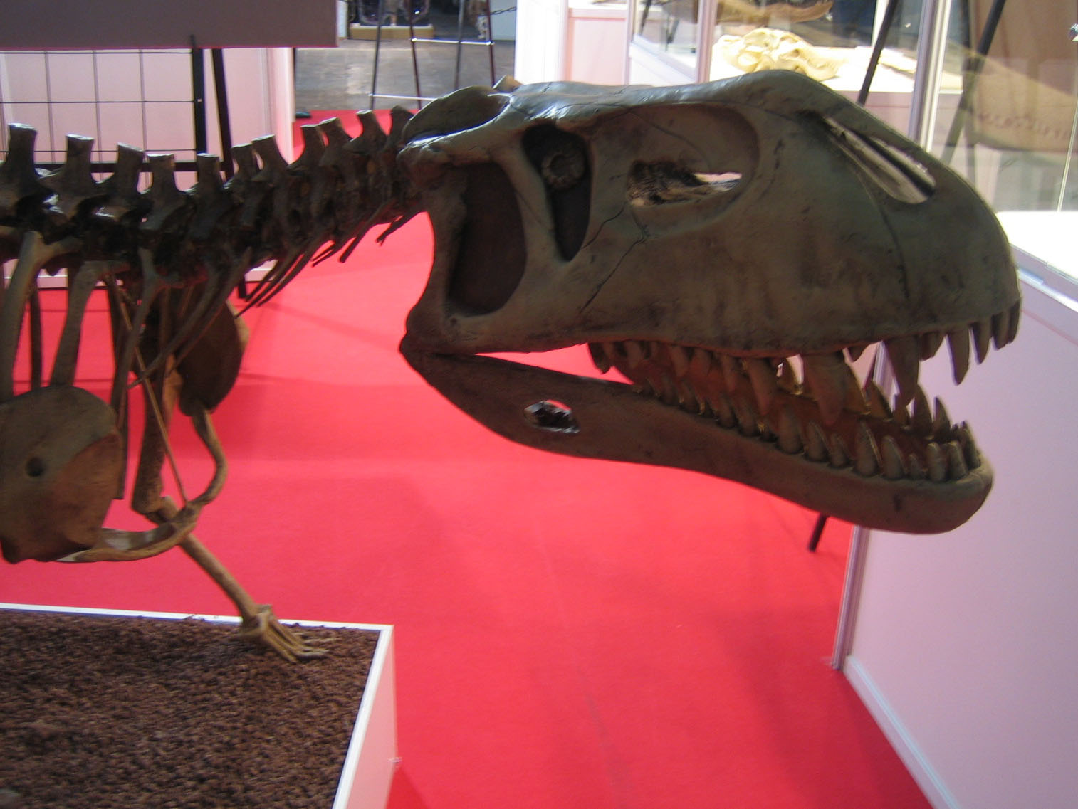 Presosuchus chiniquensis skull